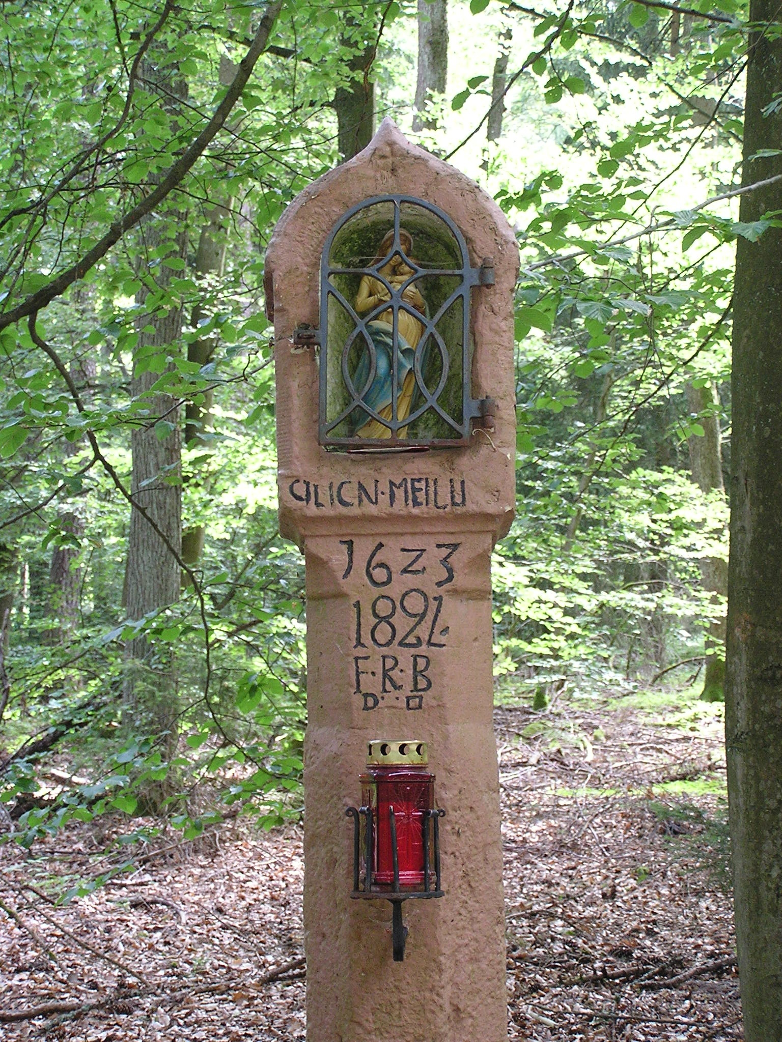 Bildstock in der Waldabteilung "Glasbild" in der Nähe von Frammersbach (Main-Spessart-Kreis, Unterfranken, Bayern, Deutschland), das sogenannte Gläserne Heilige - in der deutsch- und in der italienischsprachigen Wikipedia beschrieben.